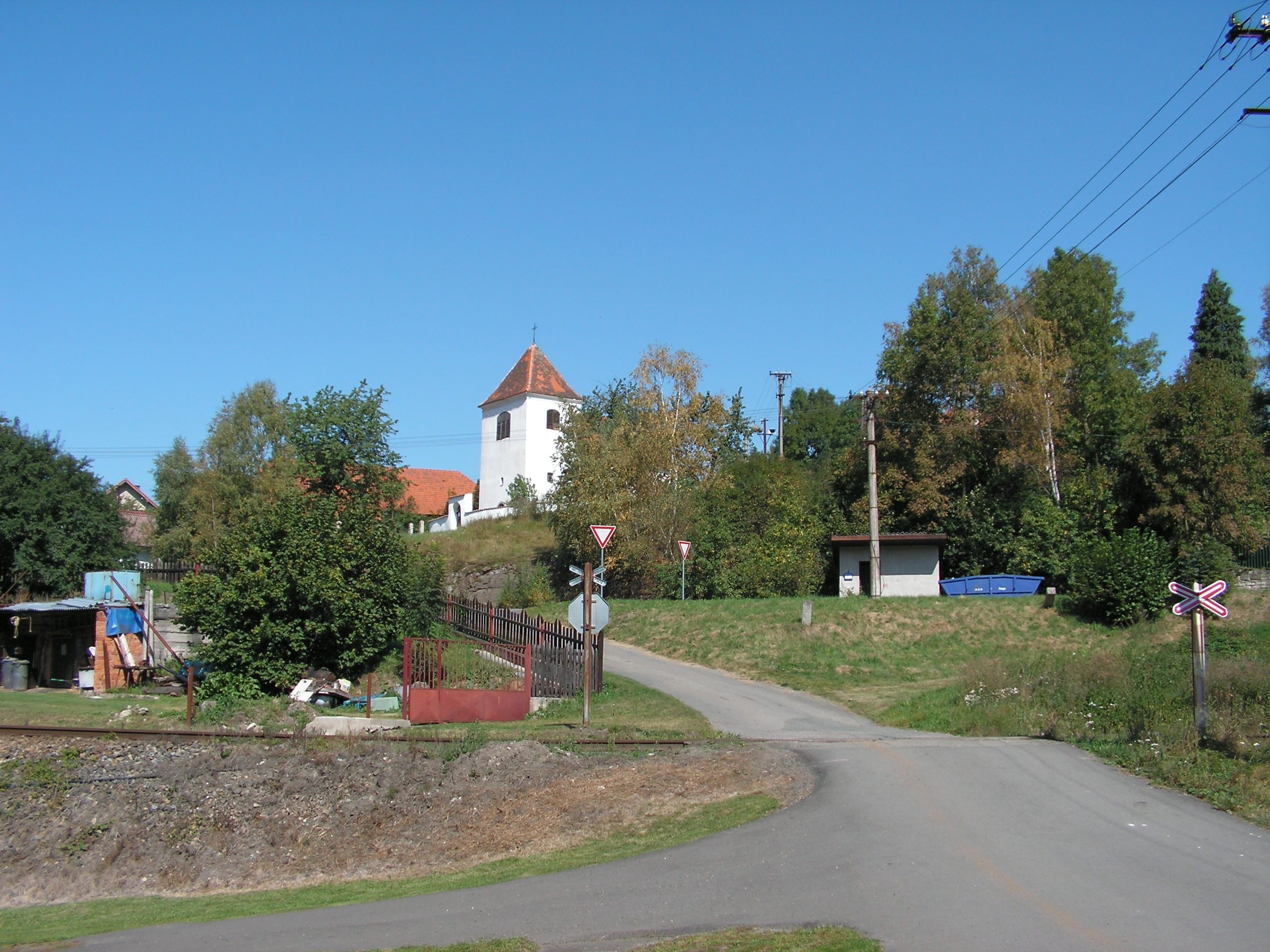 Obec Soběšín v okrese Kutná Hora.